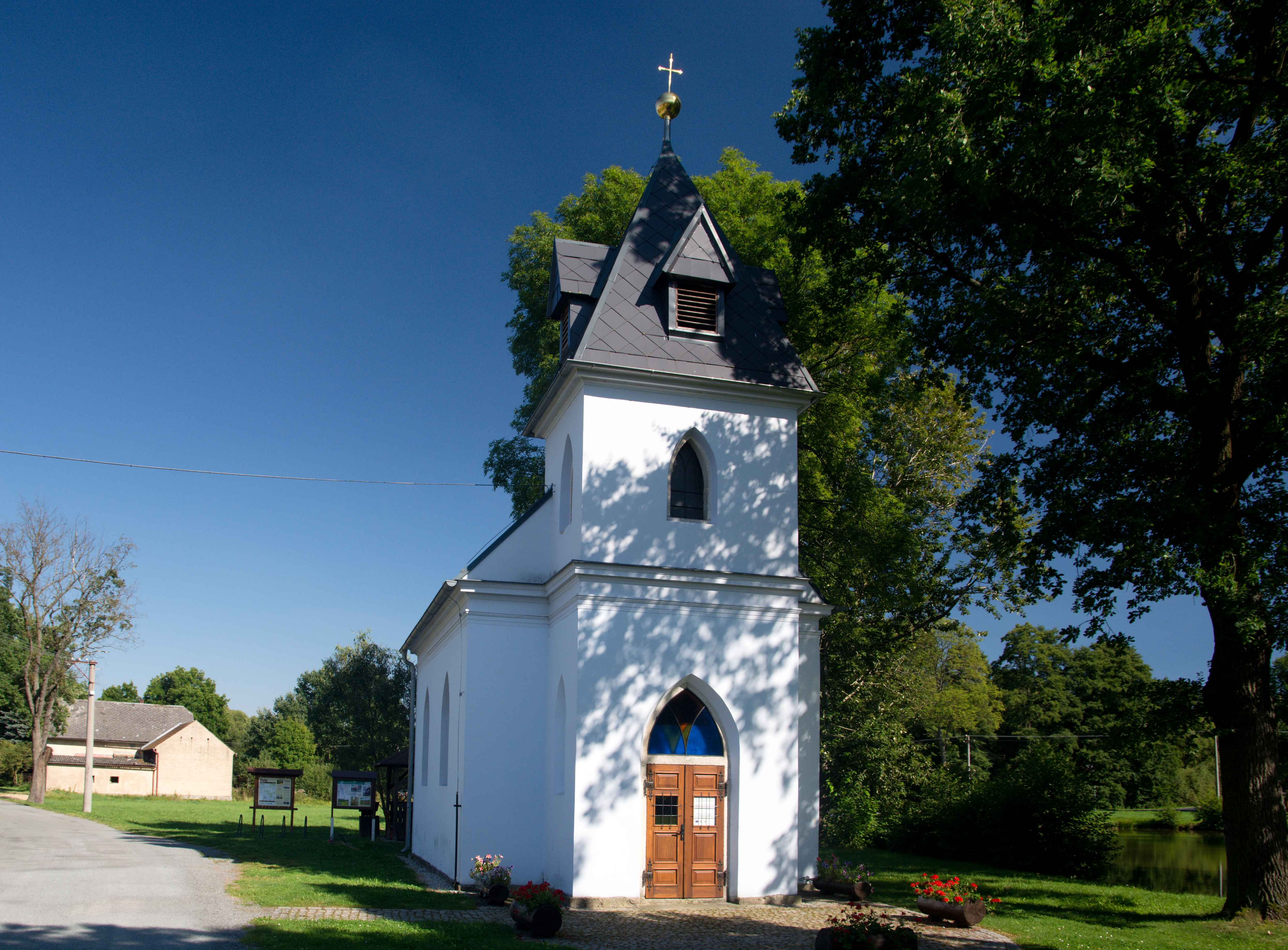 Doly Kaplička na návsi